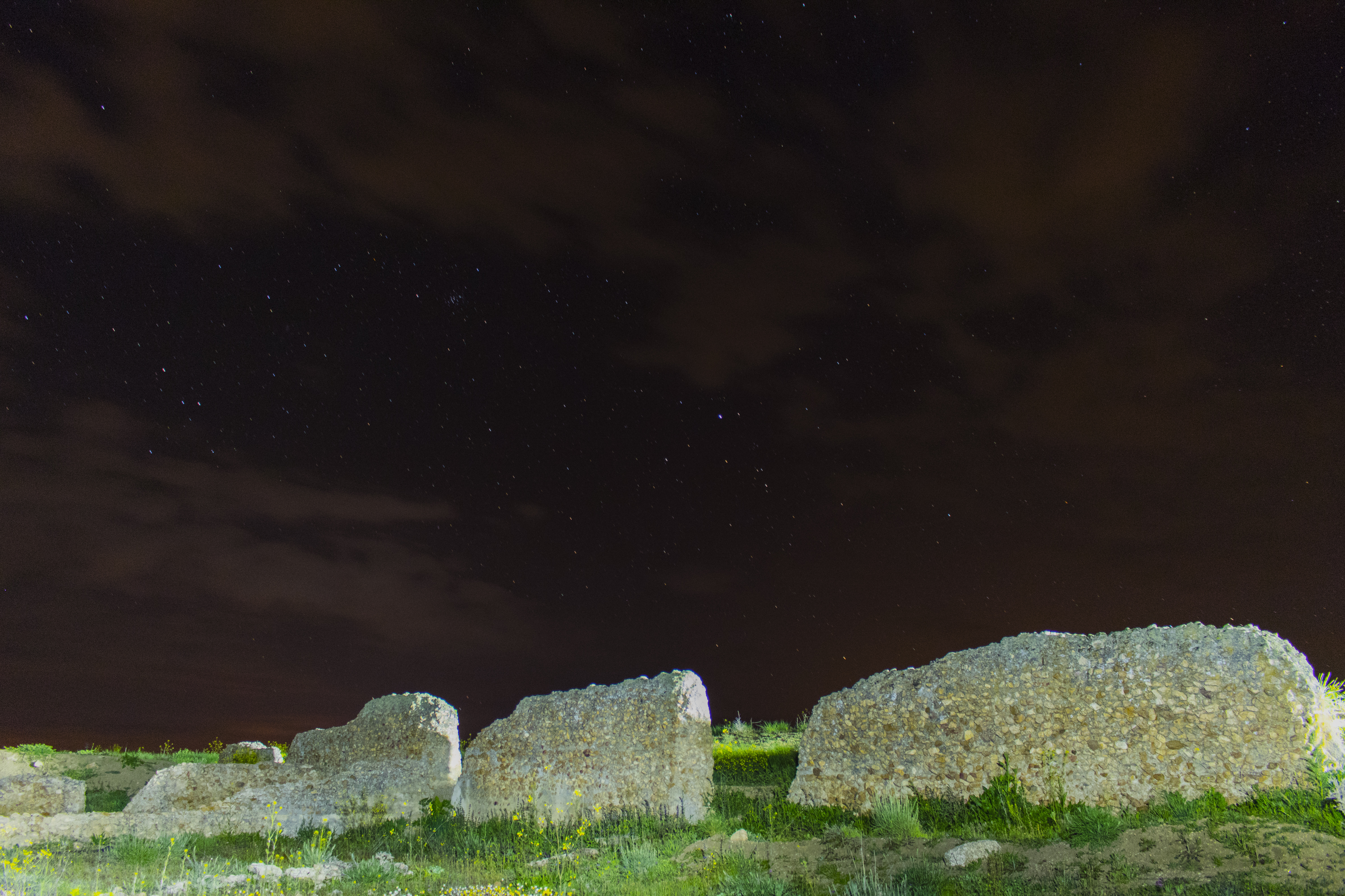 La Pared de los Moros es un yacimiento arqueológico de época romana (muy probablemente del bajo imperio romano), situado en la orilla izquierda del Rio Adaja, donde estos ancestros aprovechaban las aguas para su vida diaria. This is a photography of a Special Area of Conservation in Spain with the ID: ES4180081. Natura2000 entry, EEA entry